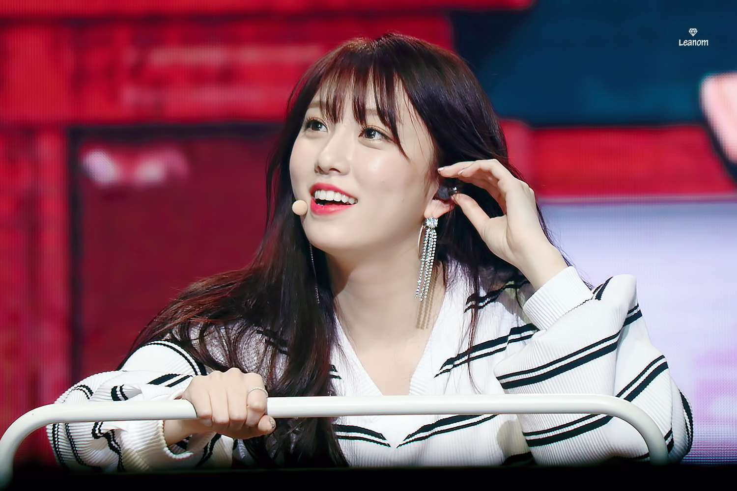 180303 유니티 팬미팅